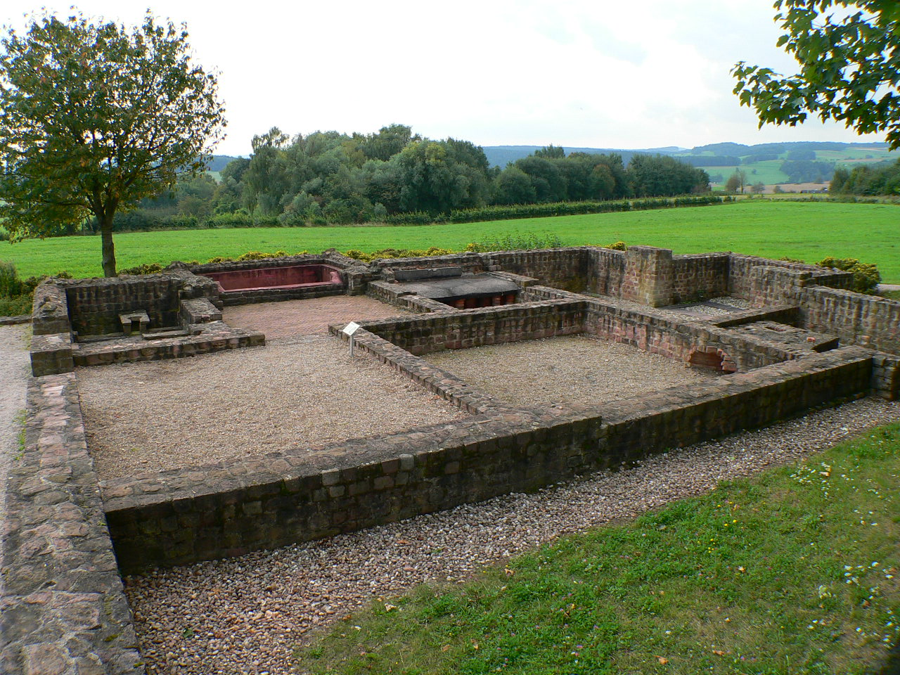 Römische Villa Haselburg im Odenwald, Hessen, Badehaus-Fundamente